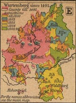 Württemberg 1495-1810 - - Courtesy of the University of Texas Libraries, The University of Texas at Austin.